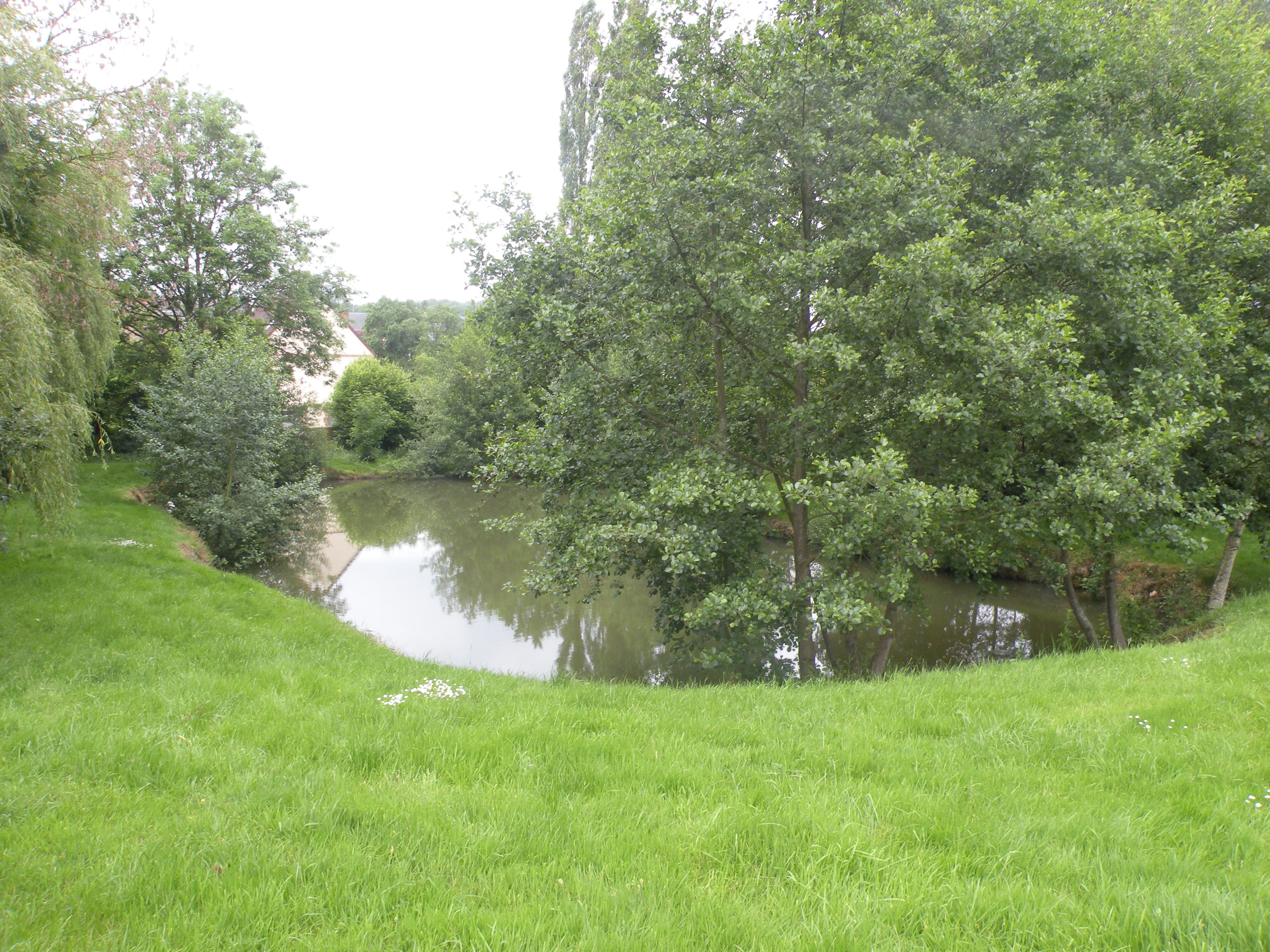 Lhéraule parc